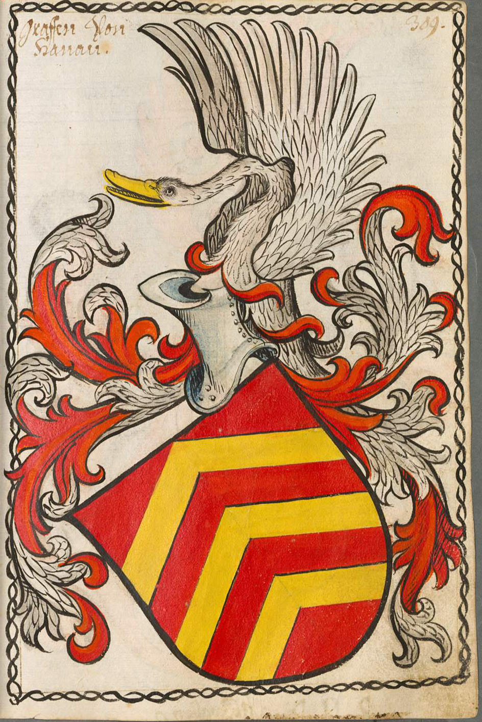 Scheibler'sches Wappenbuch , älterer Teil Grafen von Hanau